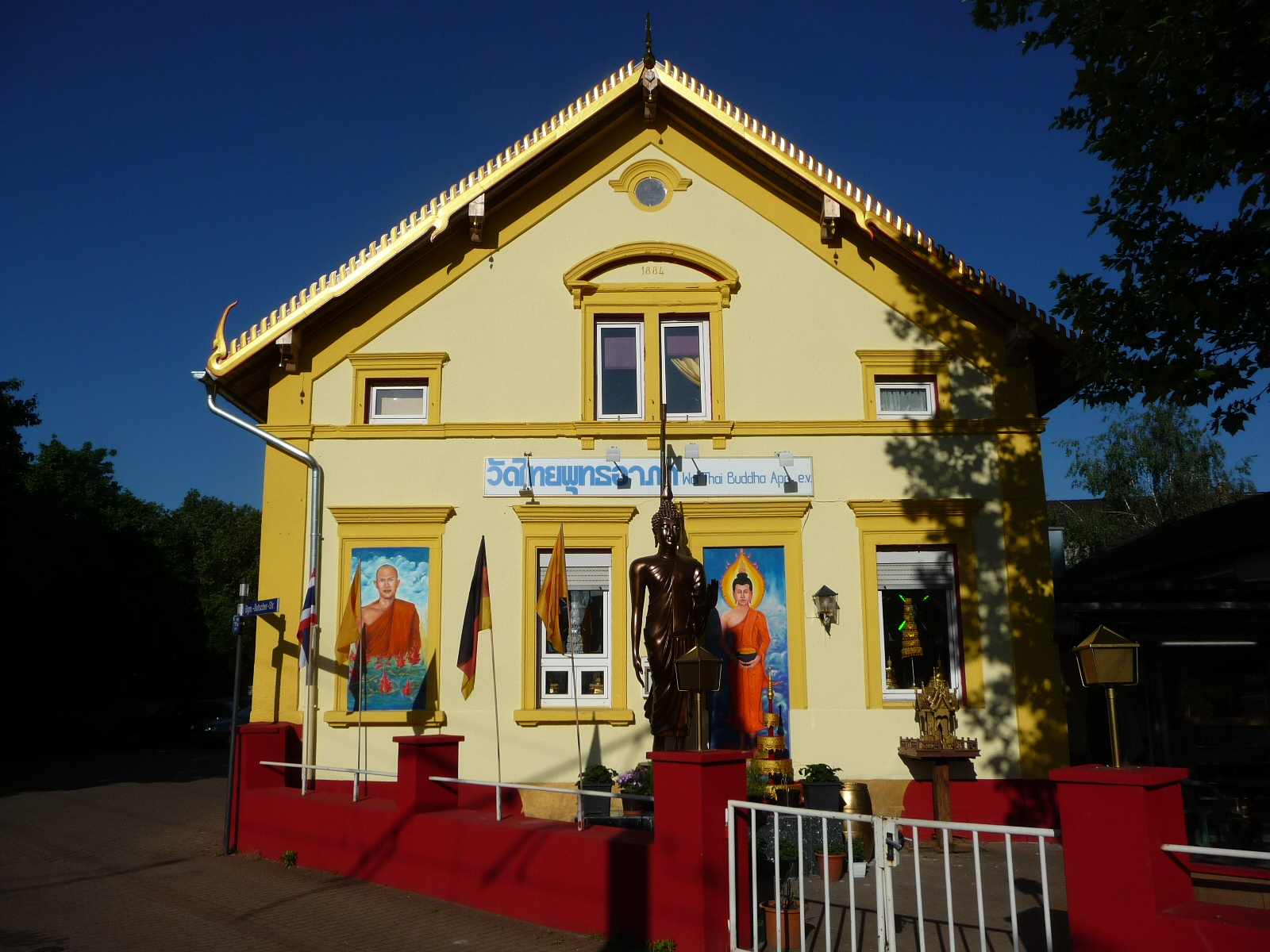 Ludwigshafen-Mundenheim